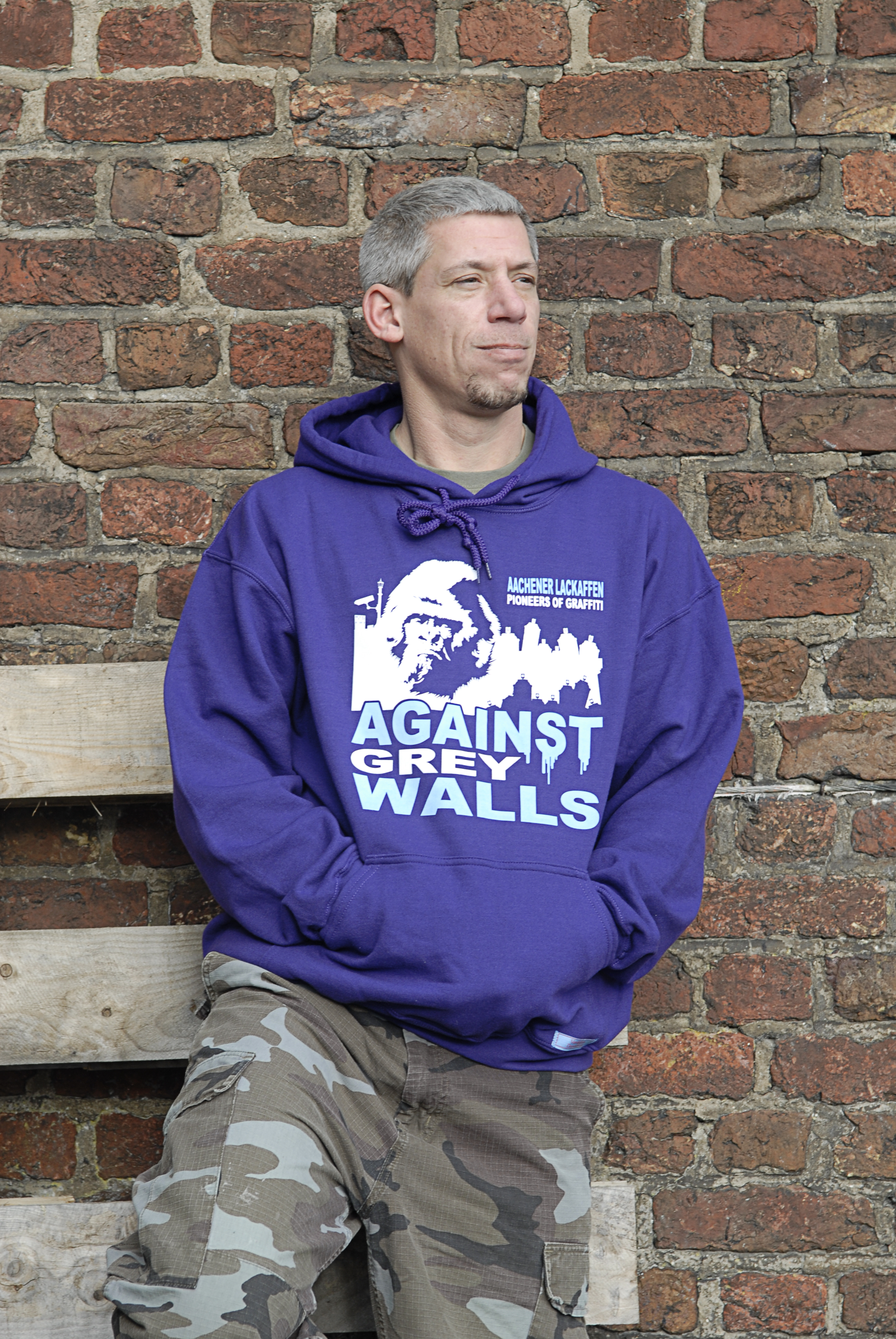 Streetwear Lake13